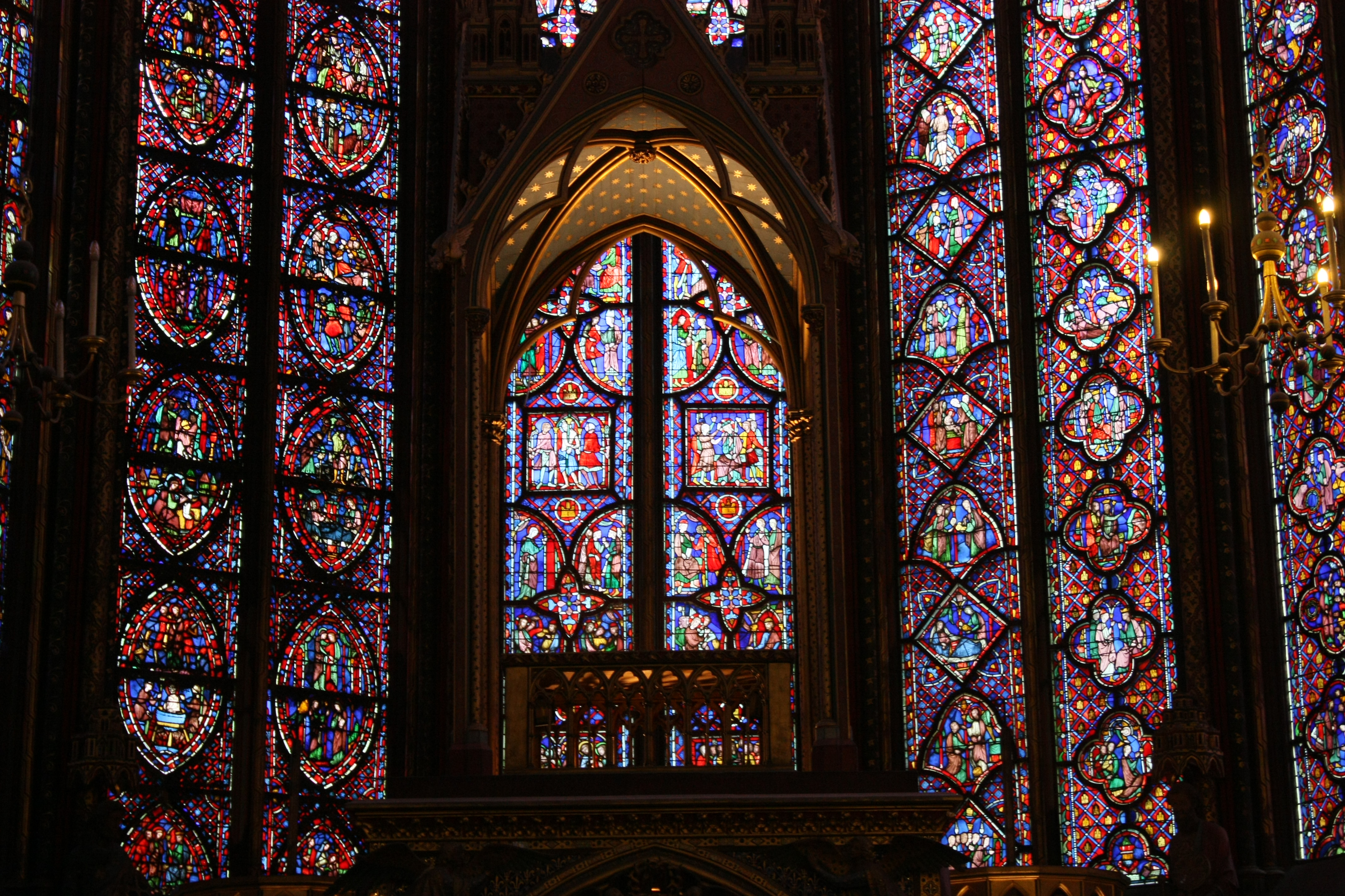 Die Fenster der in Paris befinden gotischen Kapelle Sainte Chapelle